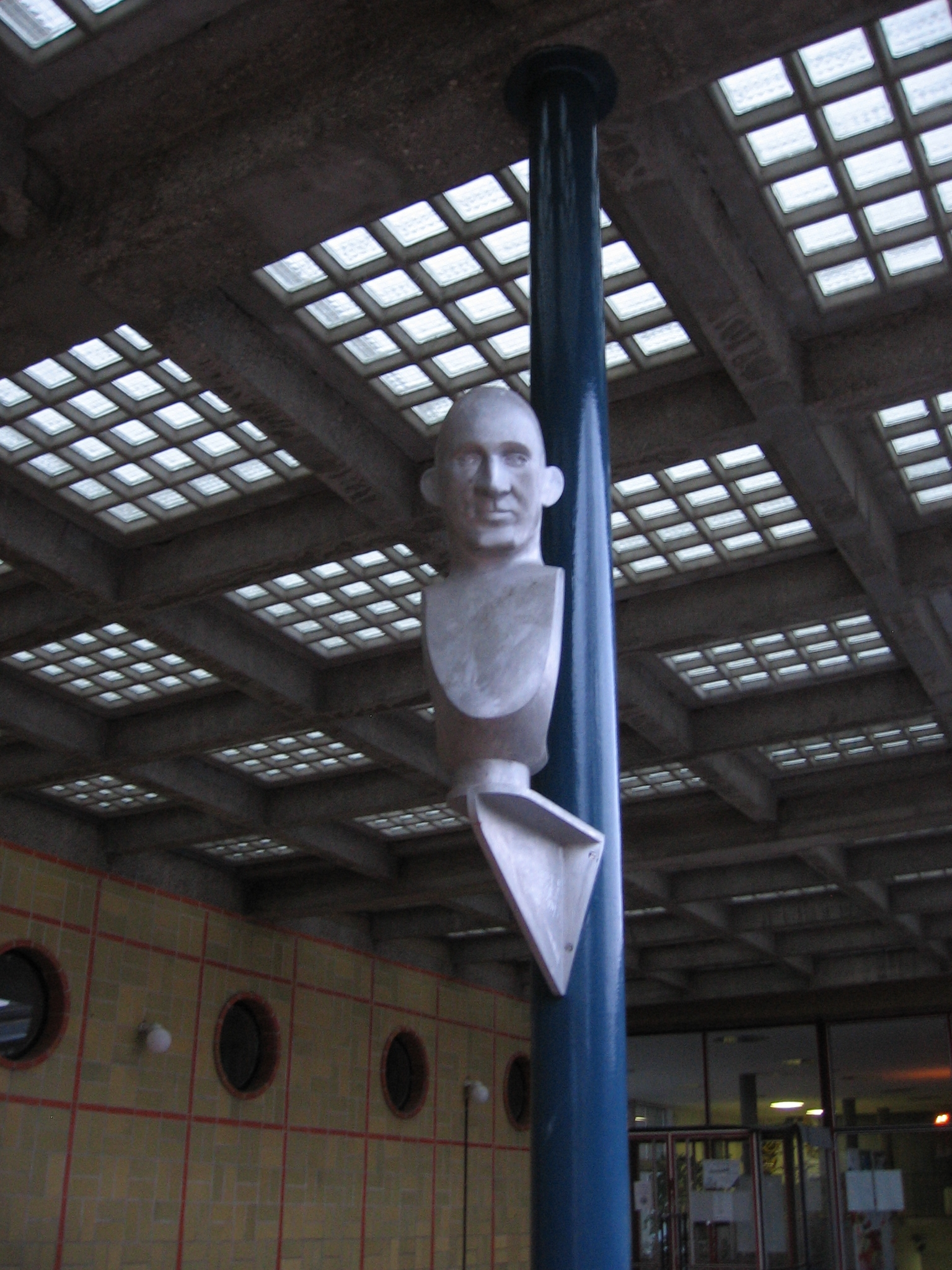 Ludwig-Georgs-Gymnasium in Darmstadt. Karl Plagge Büste von Gerhard Roese. Die zugehörige Gedenktafel.